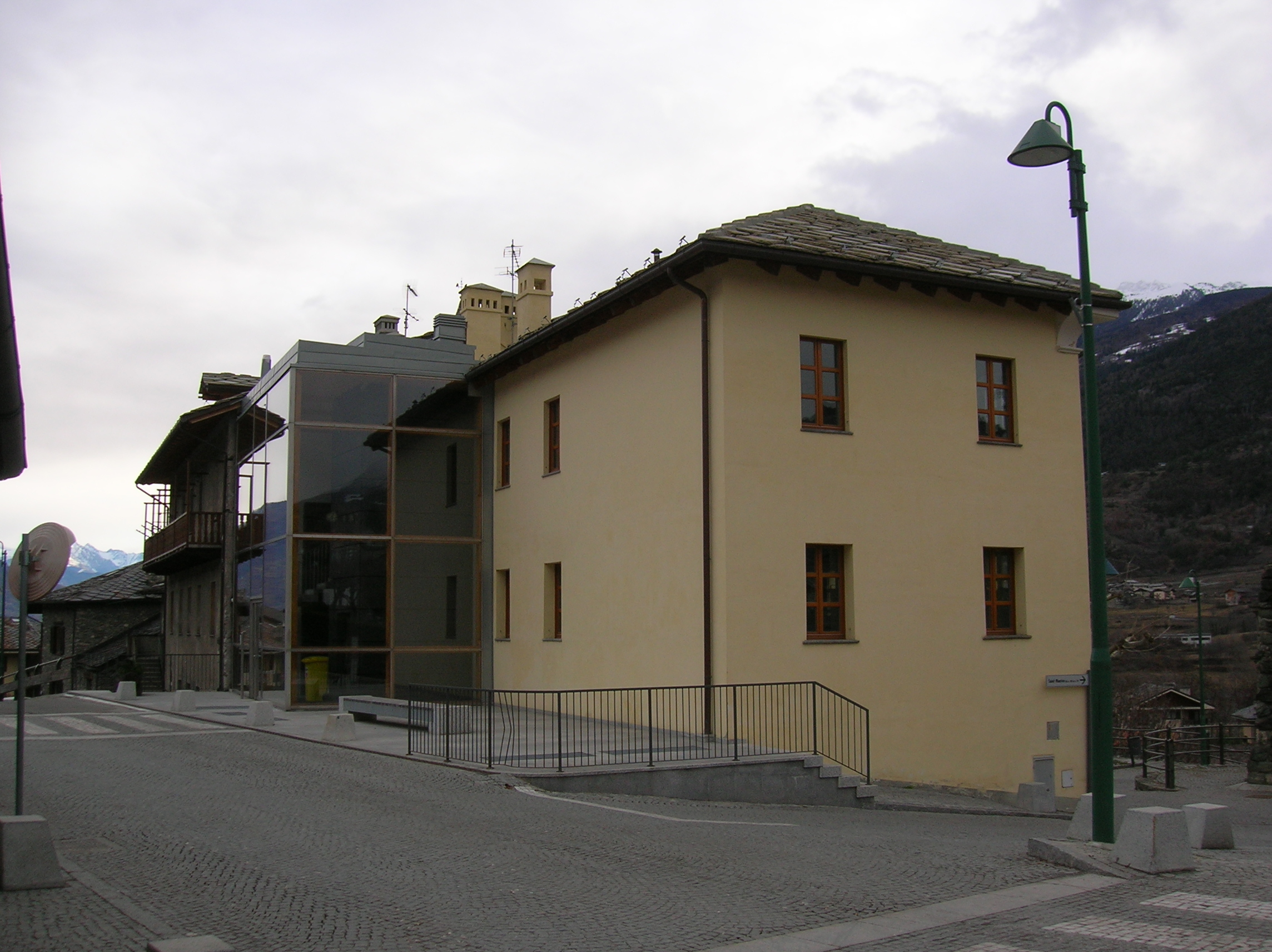 Biblioteca di Sarre, Valle d'Aosta, Italia.